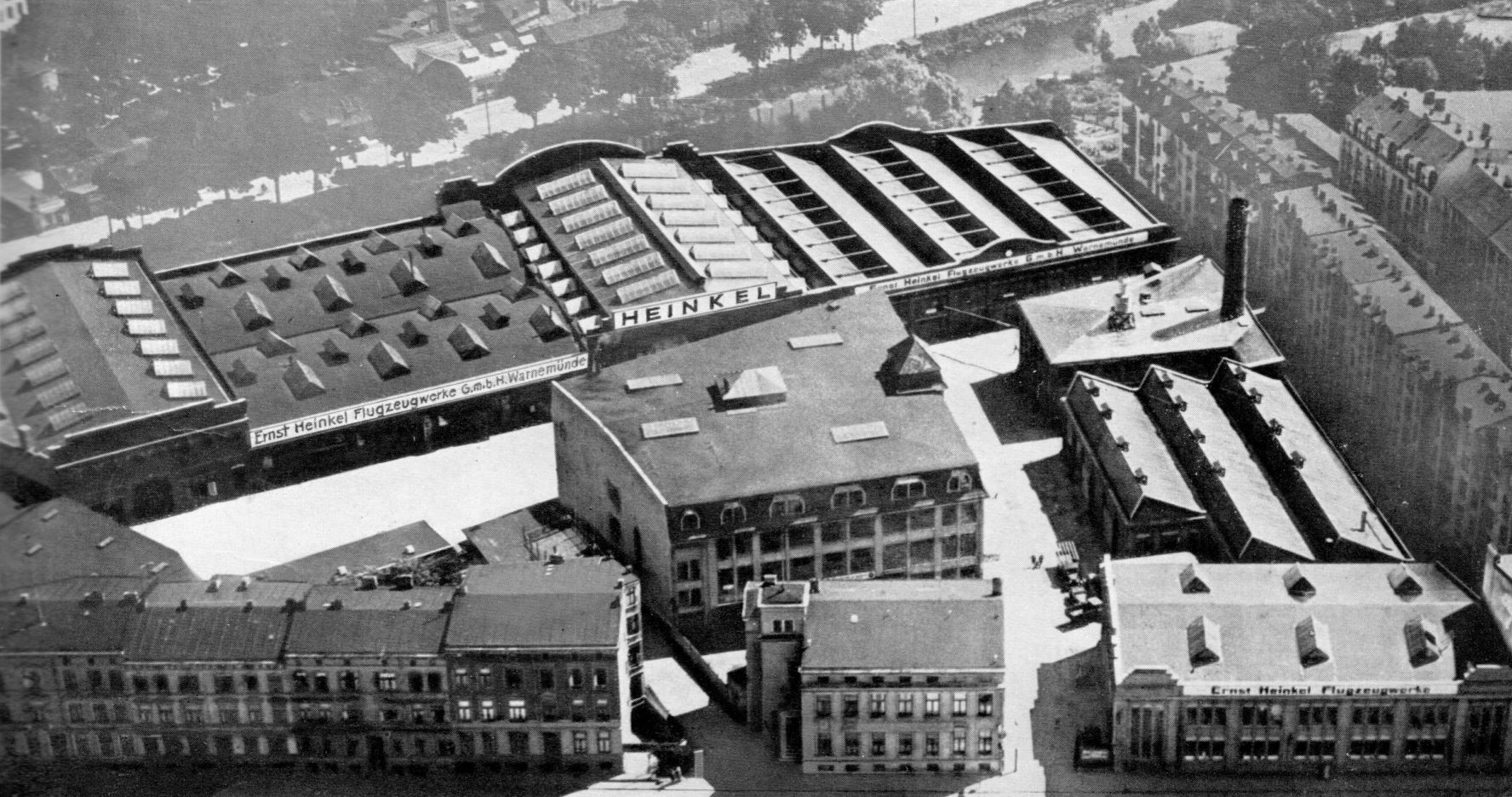 Die zweite Betriebstätte der Ernst Heinkel Flugzeugwerke in Rostock, war bis zum Bau der Hallen am heutigen Werftdreieck, in Warnemünde lokalisiert, genauer Hohe Düne an der Nordseite des Breitlings. Auf dem Gelände ist heute die Marine ansässig. Aufnahme ist auch von ca. 1930.